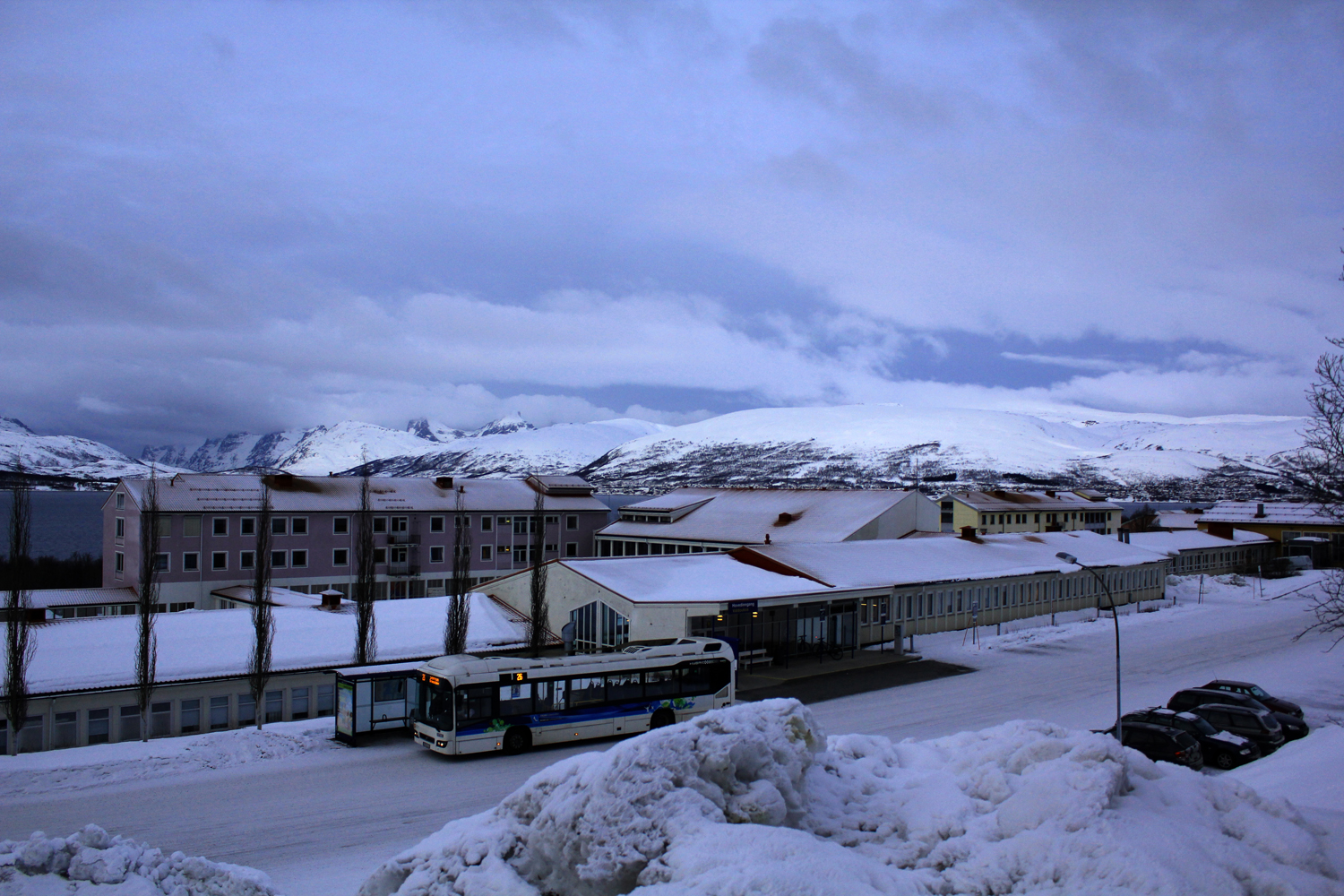 Åsgård sykehus vinter 2014